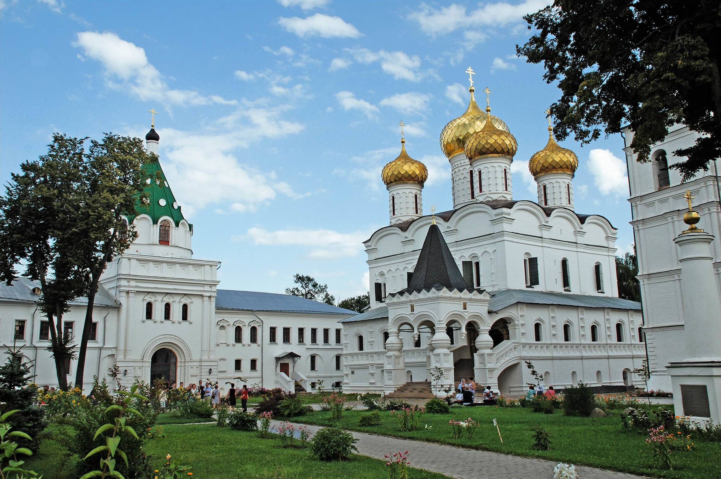 Кострома